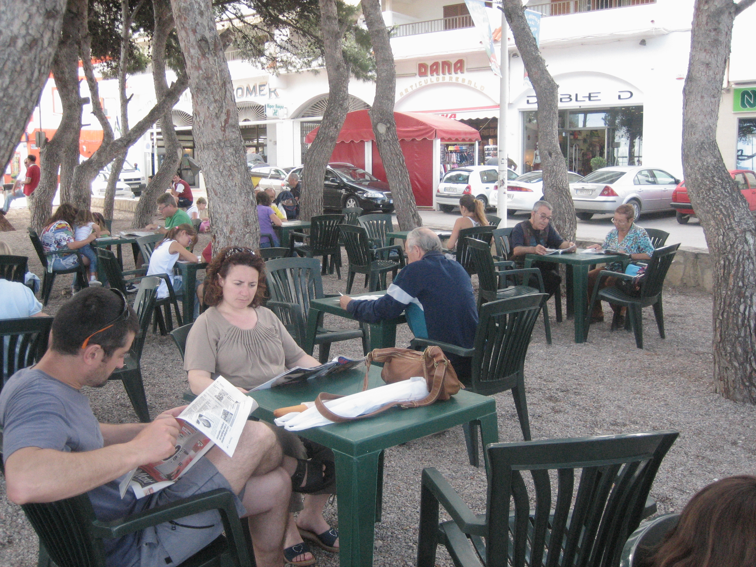 Biblioteca a la Fresca